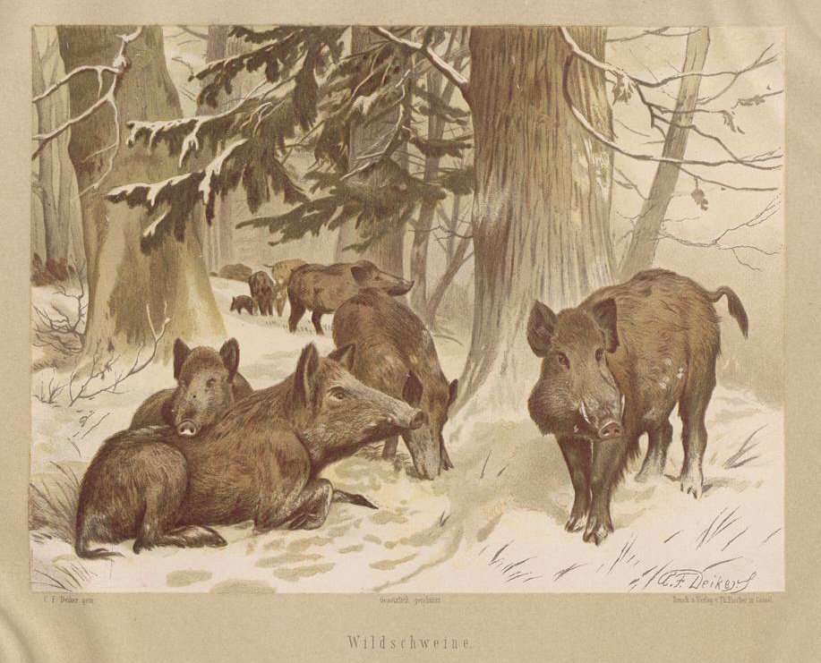 Chromolithographie aus der Serie „Jagdbare Thiere“ von Carl Friedrich DeikerWildschweine